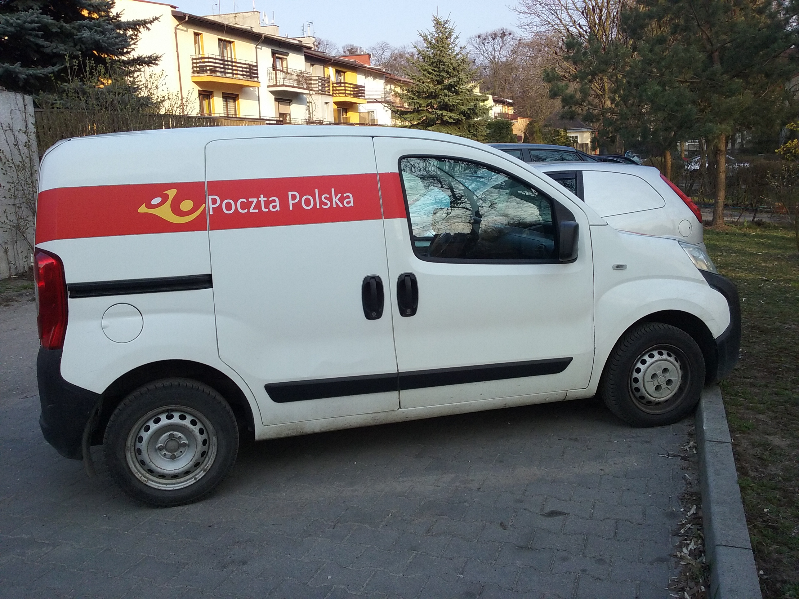 Tomaszów Mazowiecki w województwie łódzkim, PL, EU. Miejski pojazd do przewozu przesyłek Poczty Polskiej. CC0